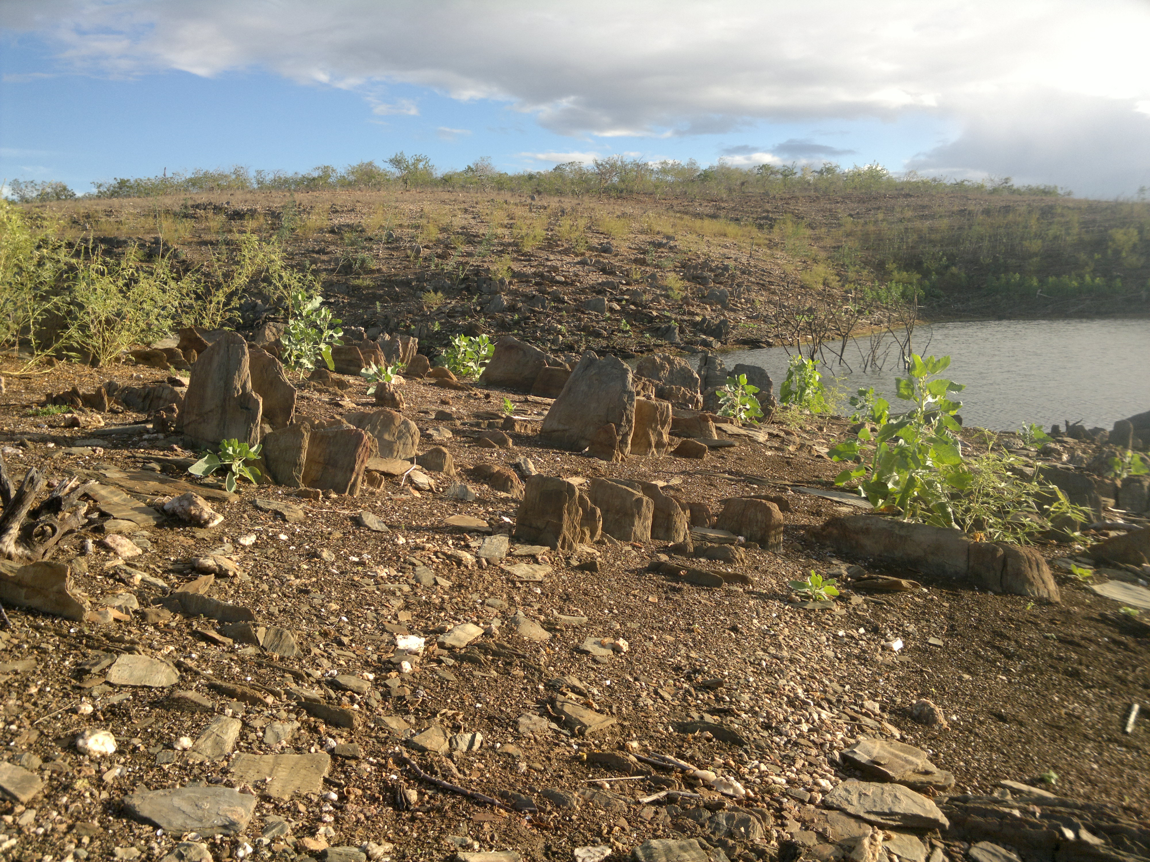 Em seu nível mais baixo, o açude Cocorobó, em Canudos - Bahia, revela belezas.